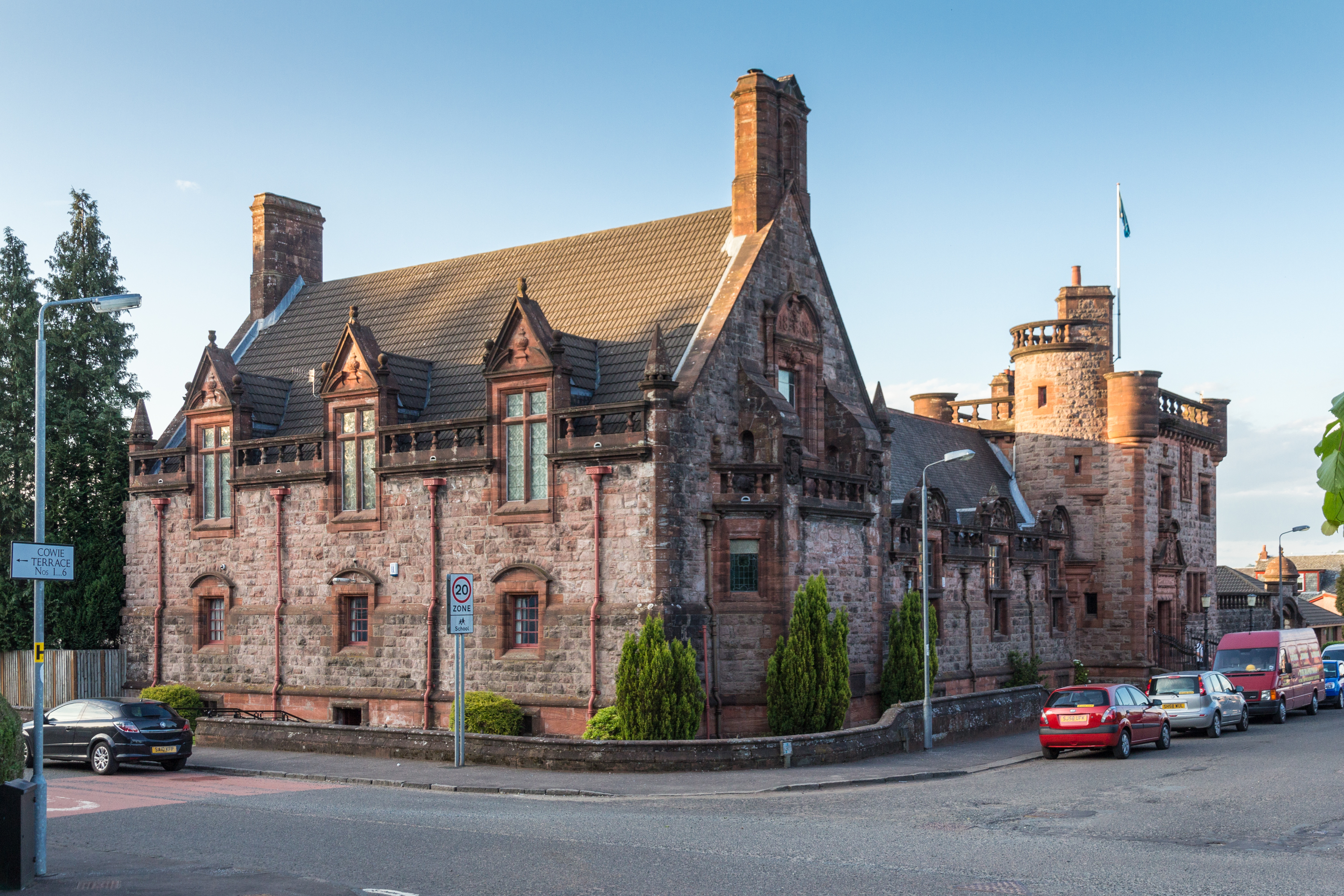 Freimaurertempel in Alexandria / West Dumbartonshire